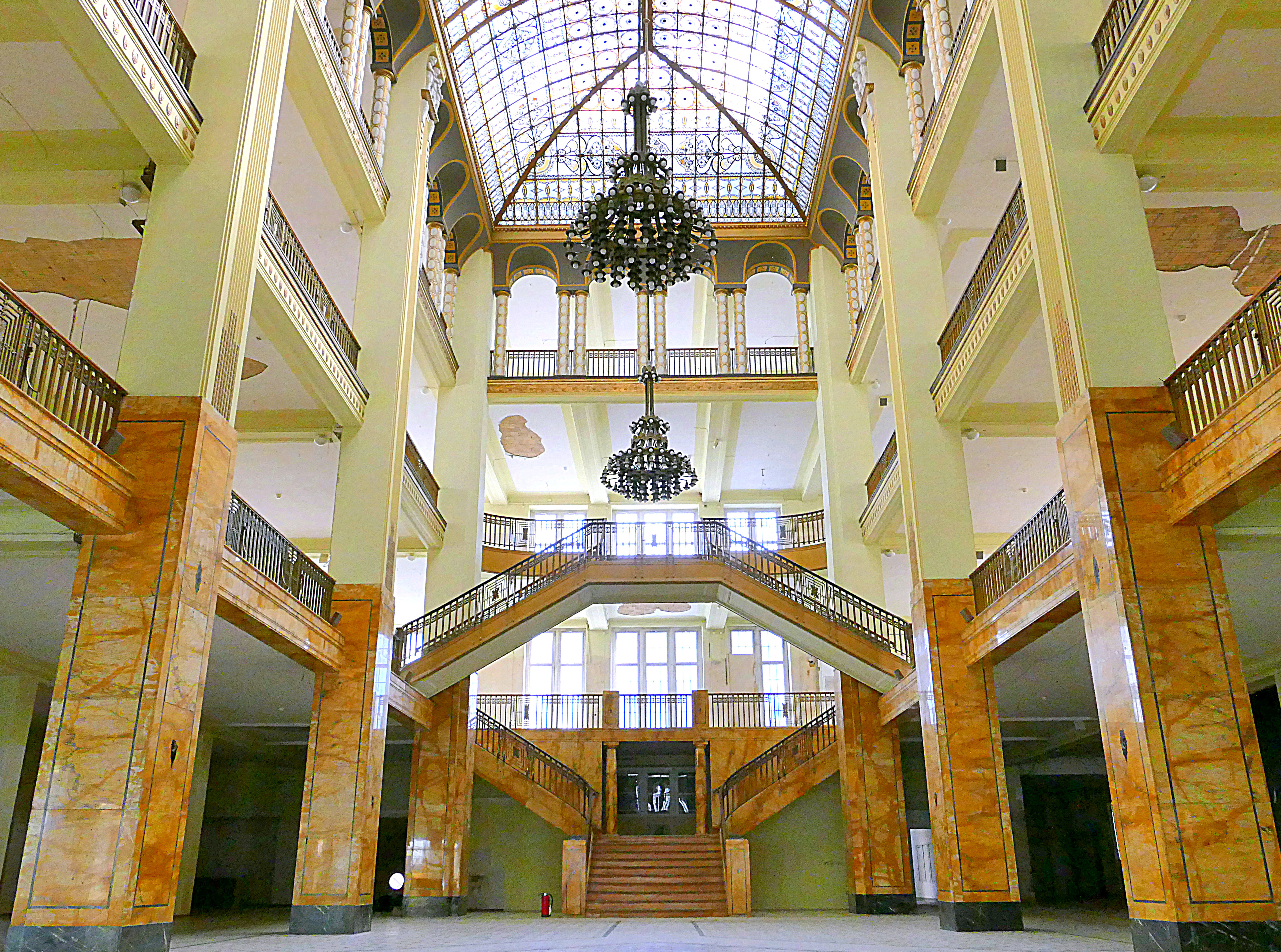 Warenhaus Görlitz - steht z.Zt. leer und wird saniert